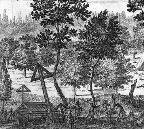 Effigies vetusti fontis dicti Yngemo kiälla ad quem olim gentilismi et Papismi temporibus frequentes fiebant munusculorum oblationes Diis et Sanctis